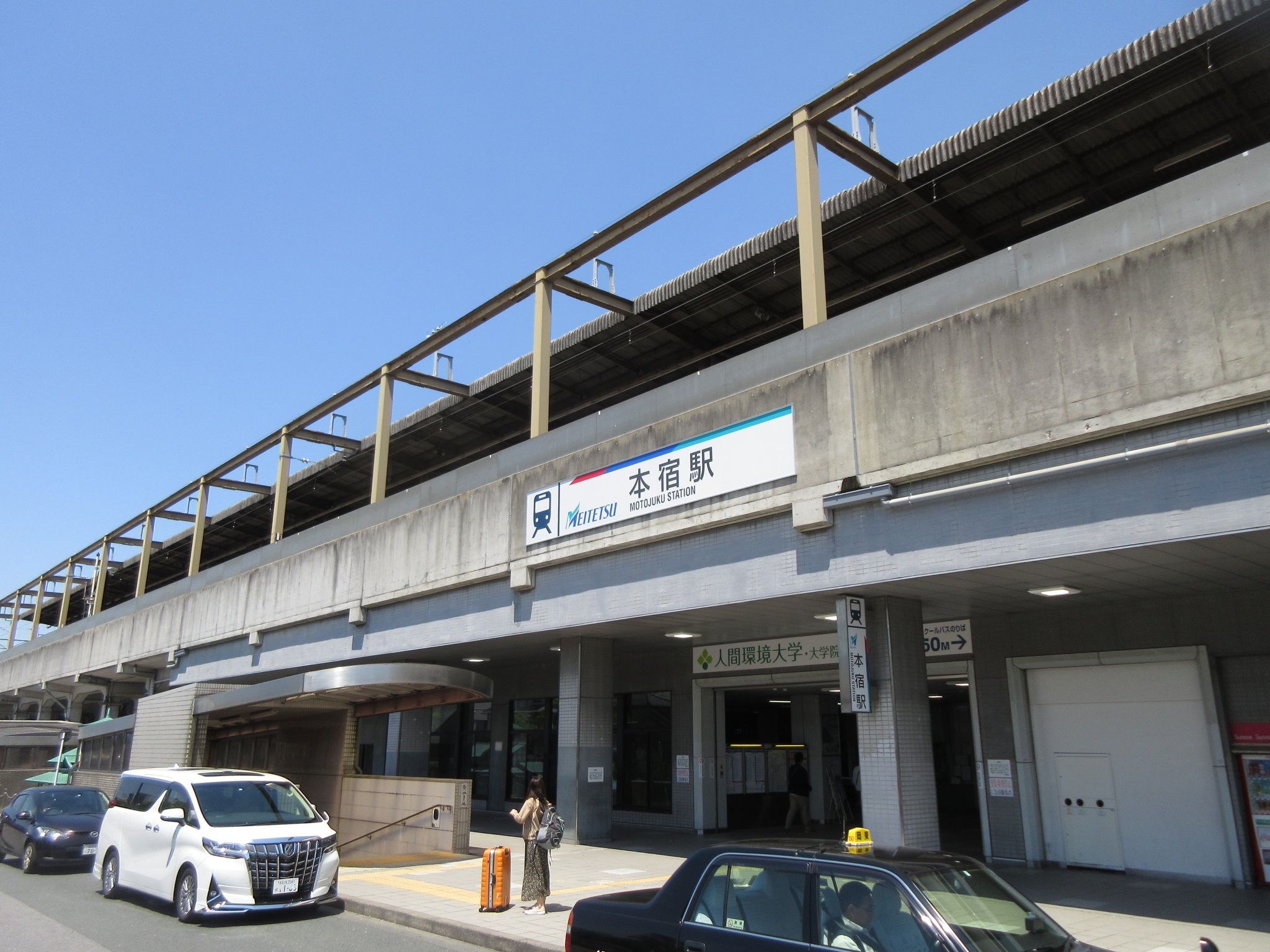 本宿駅、名鉄本線